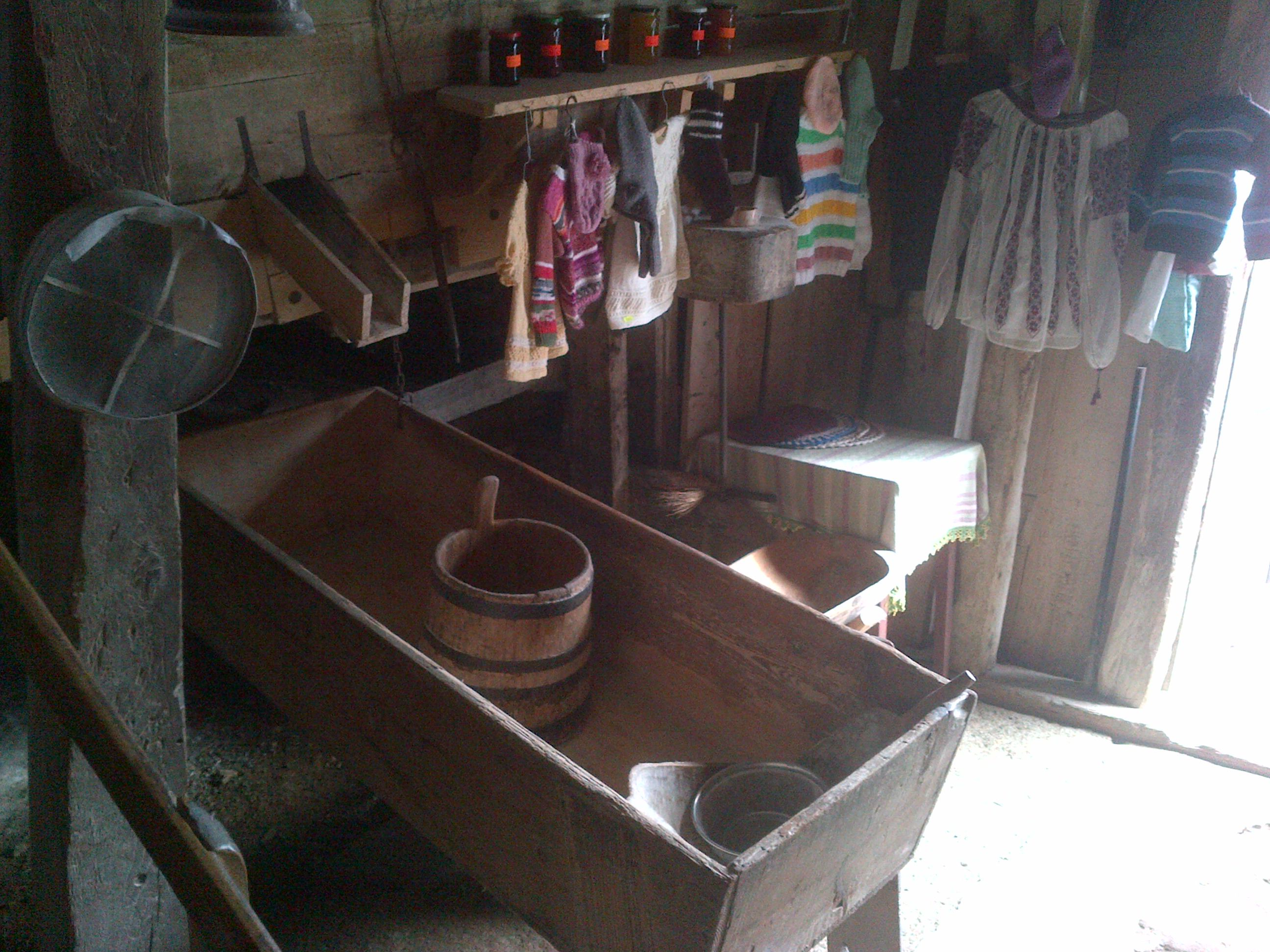 Ohaba - Moara functionala